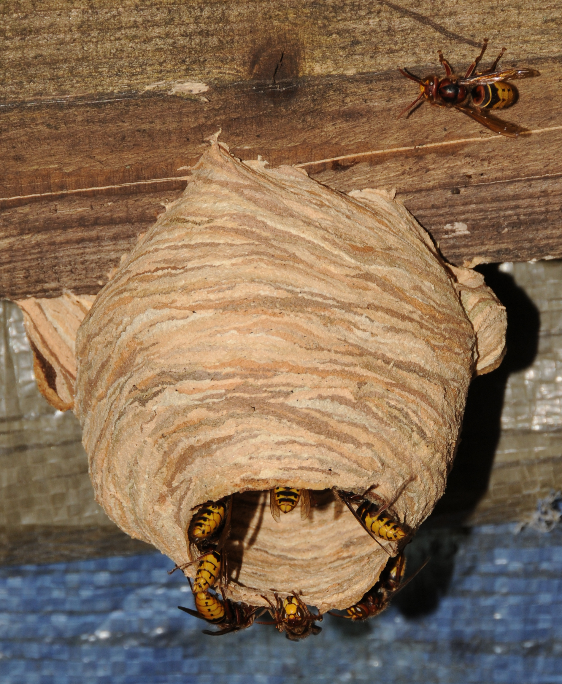 Nid de frelons (Vespa sp.)